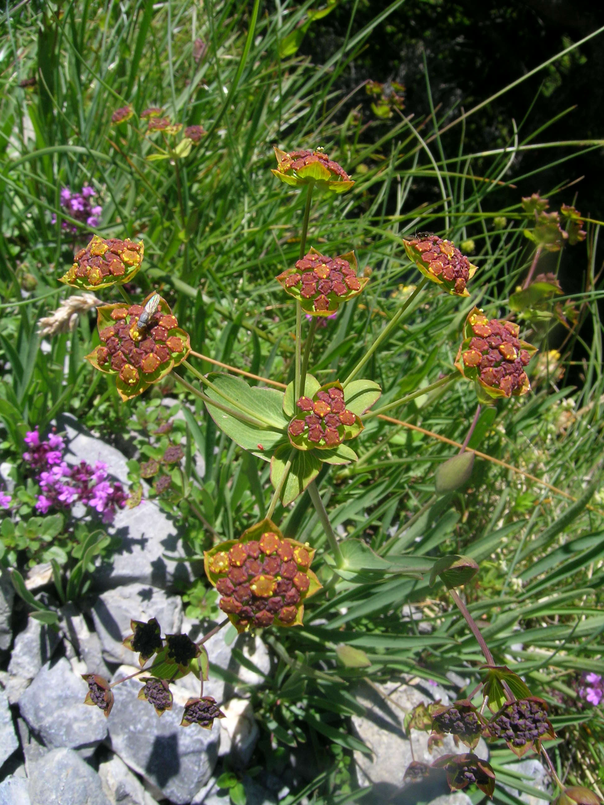 Hahnenfuß-Hasenohr (Bupleurum ranunculoides L.), Schynige Platte (Kanton Bern, Schweiz)